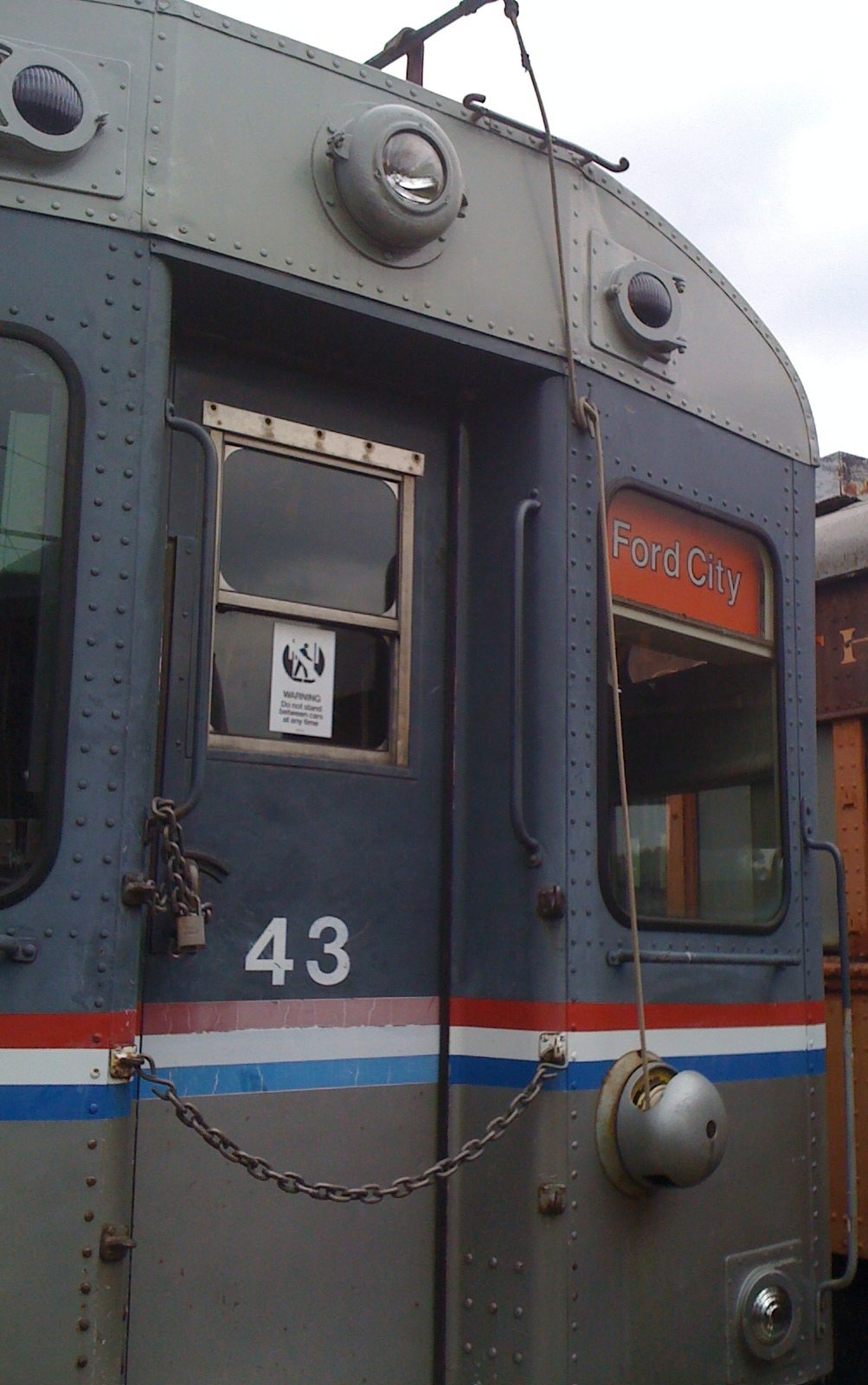 CTA Car No. 43